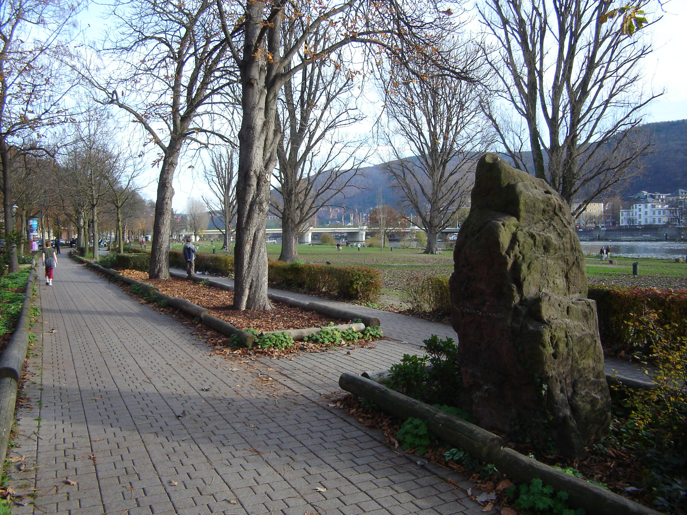 Ein Gedenkstein an der Neckarwiese in Heidelberg-Neuenheim markiert die Stelle der alten Römerbrücke.